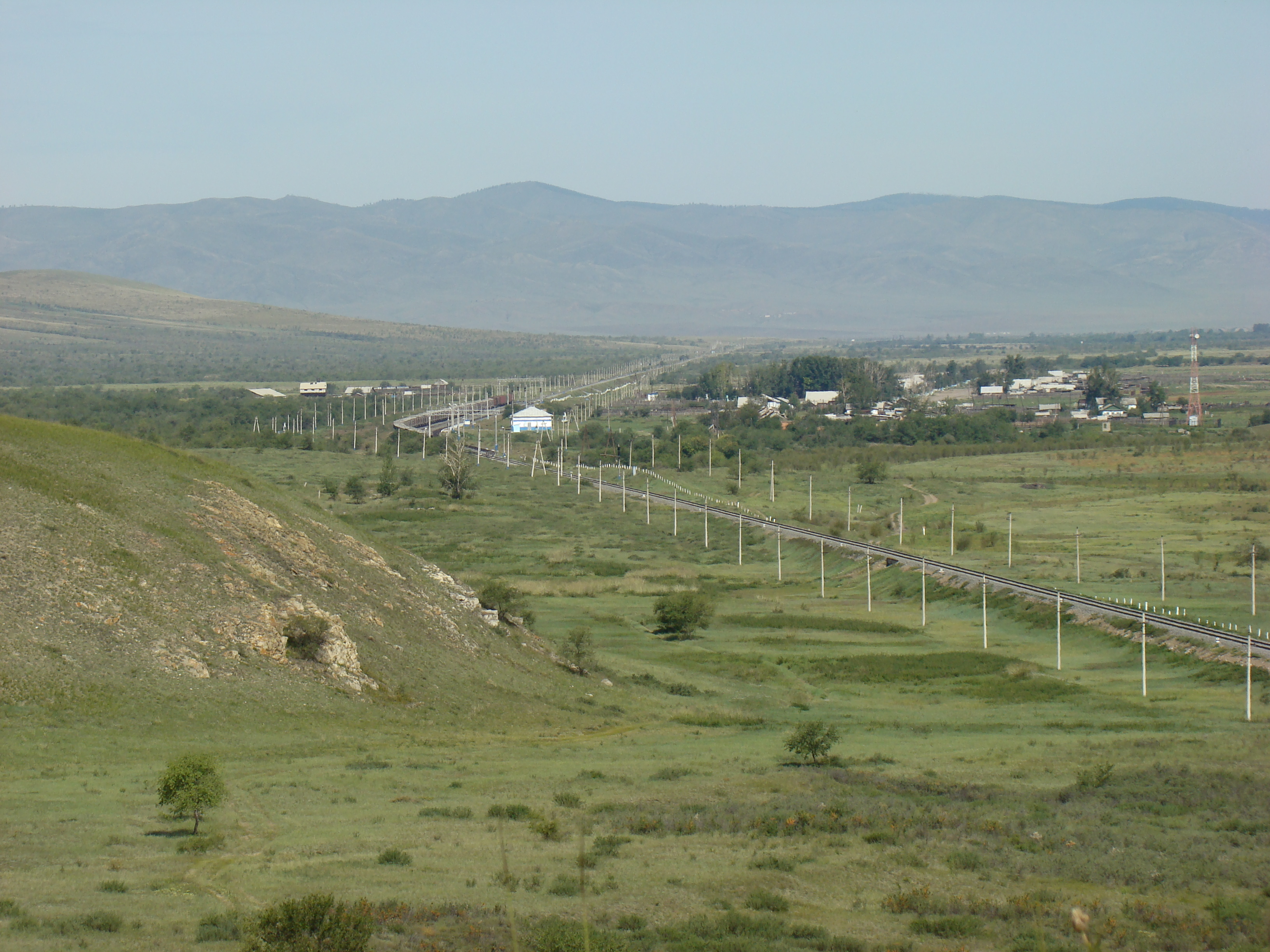 Станция Хужир - южная окраина села Зарубино